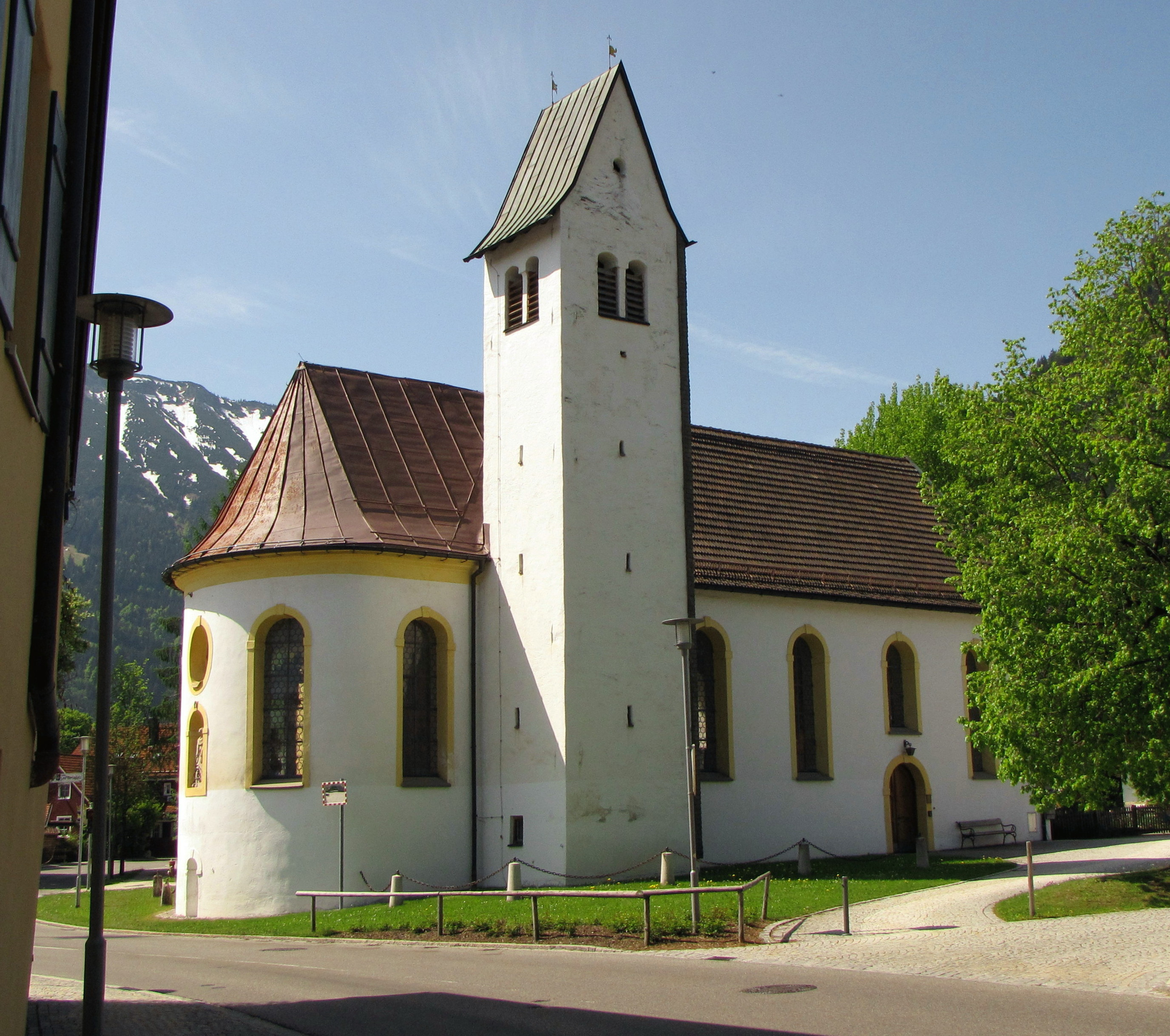 Filialkirche St. Leonhard in Pfronten-Heitlern